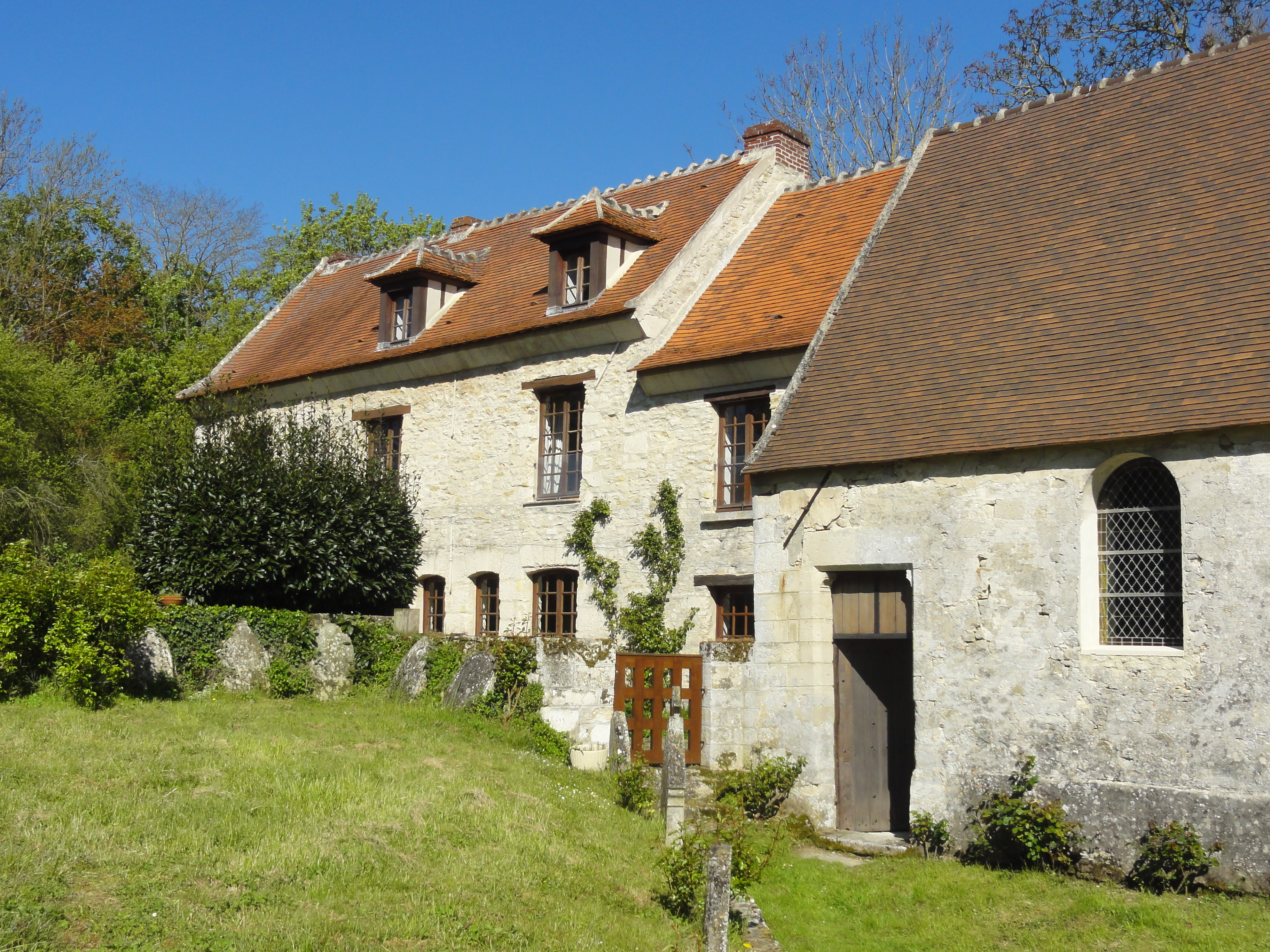 Église Saint-Georges de Bray - voir titre.